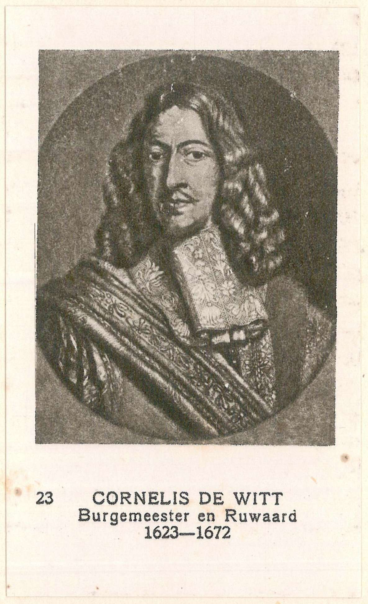 23 cornelis de witt, burgemeester en Ruwaard, 1623-1672. Vaderlandse Historie 2 (1926)